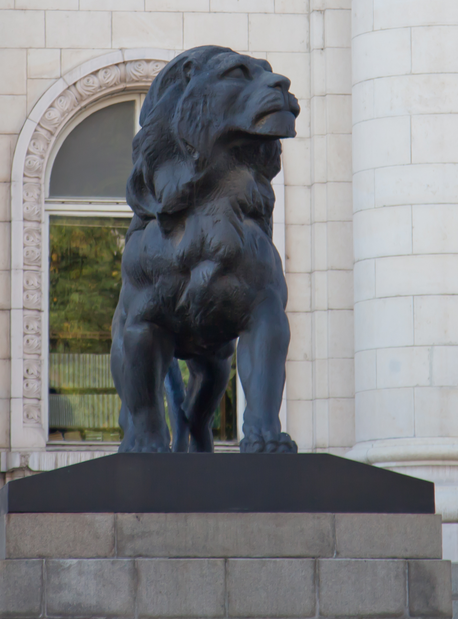 Sofia; Justizpalast